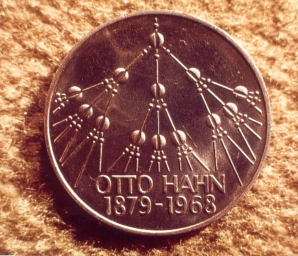 Gedenkmünze zur Entdeckung der Kernspaltung durch Otto Hahn, BRD